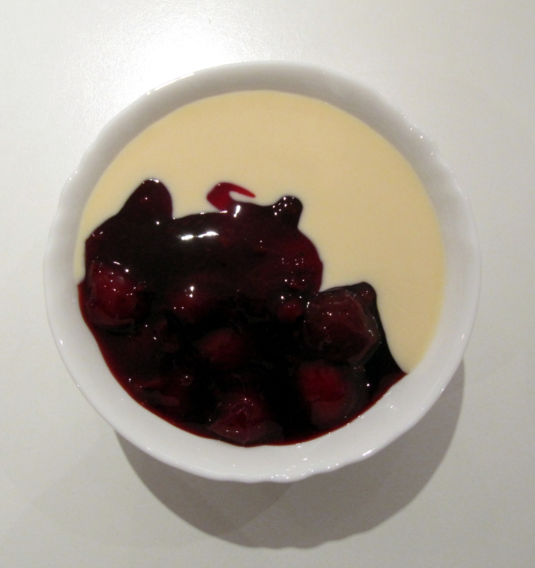 Rote Grütze mit Vanillesauce in Hamburg.